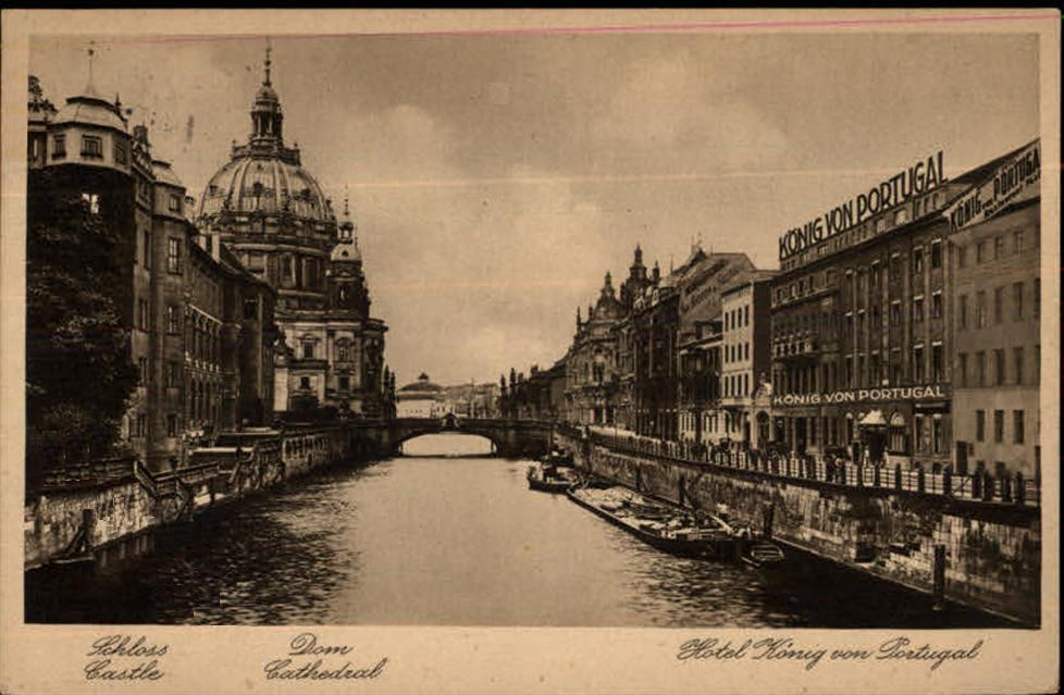 Ansicht der Spreeseite des Berliner Stadtschlosses und der gegenüberliegenden Burgstraße mit dem Hotel zum "König von Portugal".